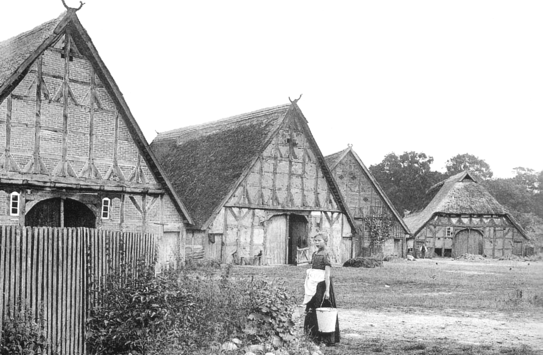 Jameln